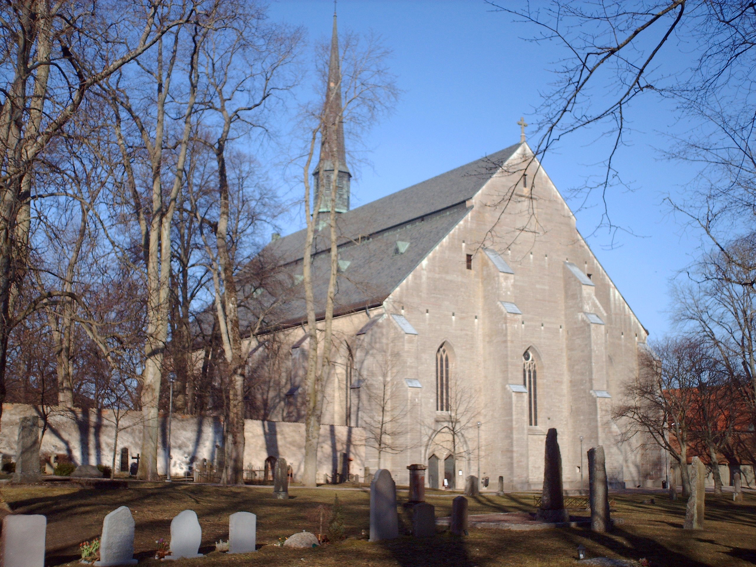 Vadstena Abbey Church, Sweden.